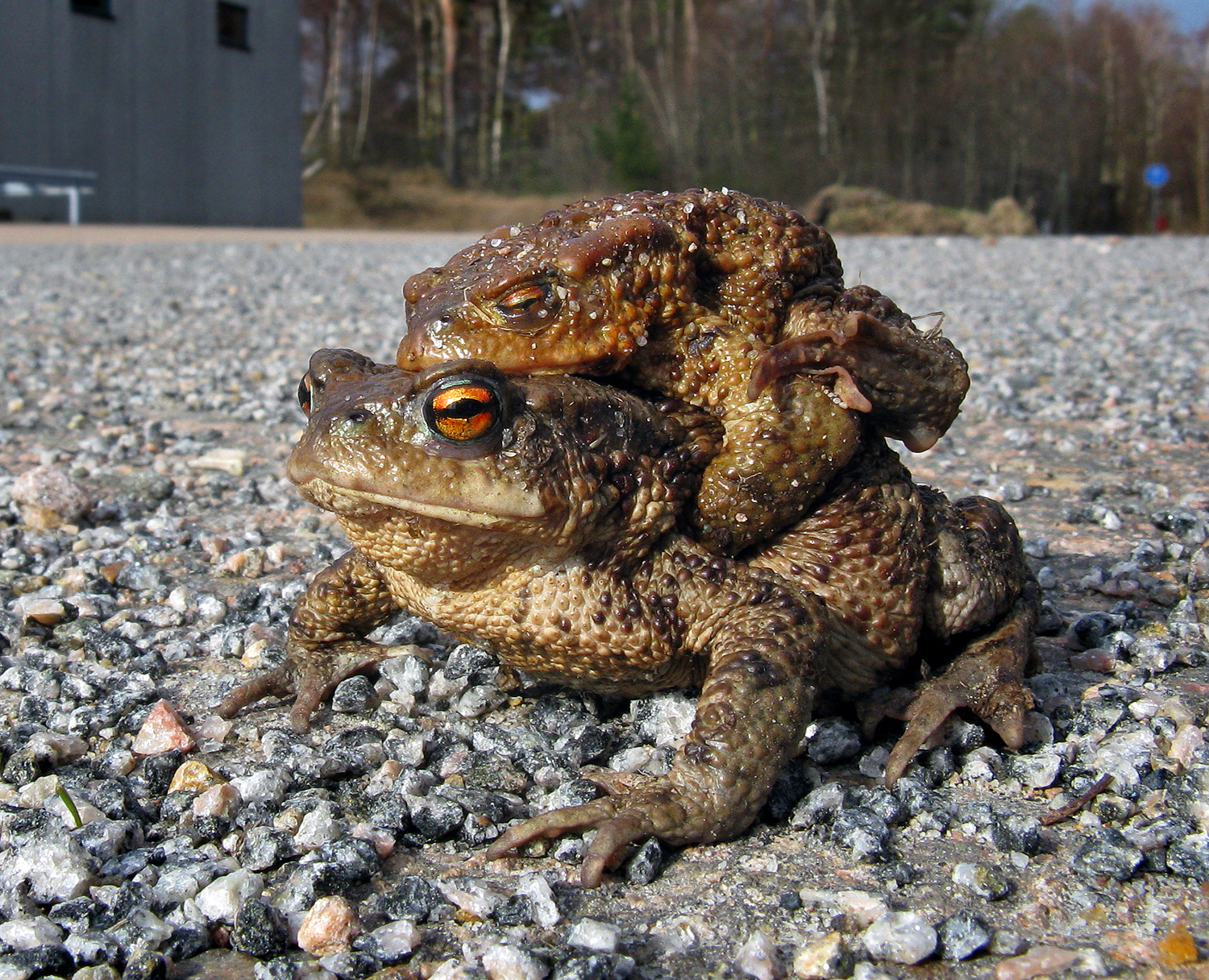 Vanlig padda (Bufo bufo). En hona på väg under parning med sin hane på ryggen.